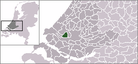 Location of Vlaardingen